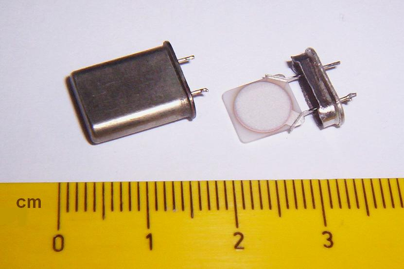 ... Fotograf/Datum: Ulfbastel 11:13, 21. Jan 2006 (CET) andere Versionen: quarz5.jpg (Oldtimer)